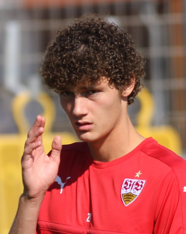 Benjamin Pavard beim ersten öffentlichen Training. Aufgenommen von